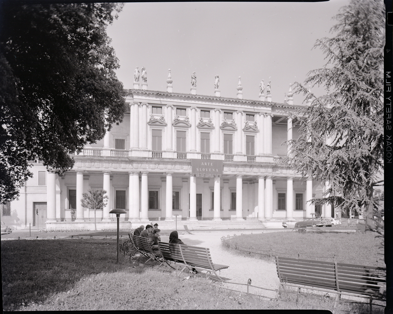 Palazzo Chiericati. Facciata su Piazza Matteotti. Servizio fotografico : Vicenza, 1966 / Paolo Monti. - Buste: 12, Fototipi: 12 : Negativo b/n, gelatina bromuro d'argento/ pellicola ; 10x12. - ((Serie costituita da 12 buste sciolte di negativi identificati con i nn.: 12630, 12631, 12632, 12633, 12634, 12635, 12636, 12637, 12638, 12639, 12640, 12641. - Occasione: Documentazione per la pubblicazione: Cecchi Emilio, Sapegno Natalino (a cura di), "Storia della Letteratura Italiana", 9 voll., Milano, Garzanti, 1966 e segg. - Fonte: Agenda di Paolo Monti: Monti/ 3 aprile 1966 - 9 marzo 1971/ 12421-16823 (1966-1971), presso Archivio Paolo Monti. - Fonte: Monografia di Cecchi Emilio, Sapegno Natalino (a cura di): Storia della Letteratura Italiana, 9 voll., Milano, Garzanti (1966 e segg.)